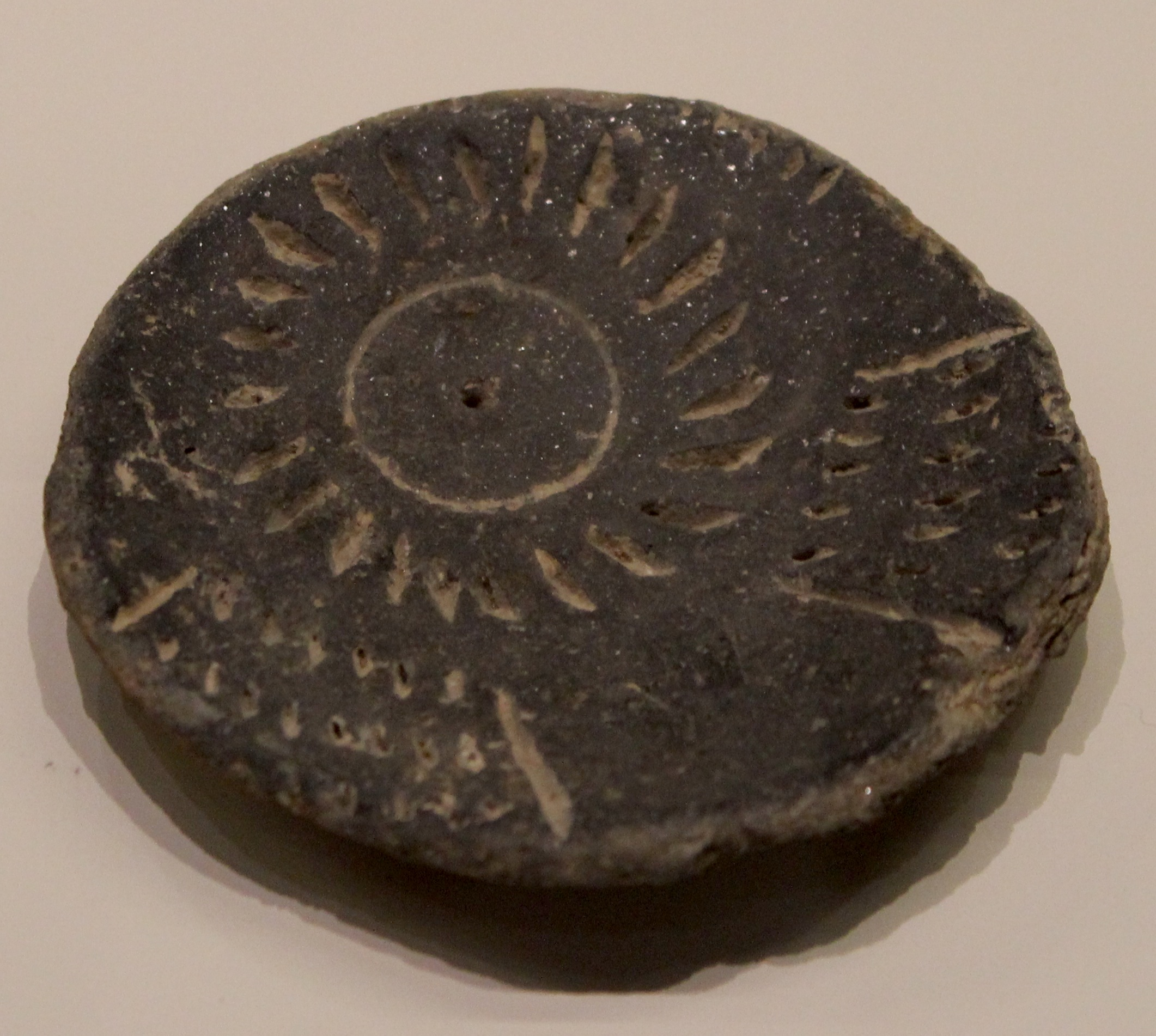 Madrid, M.A.N. Cuenco de Almizaraque, cultura de Los Millares.